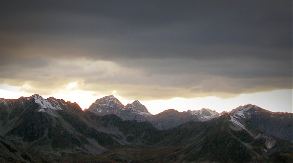 Zonsondergang in het hoge Valtellina